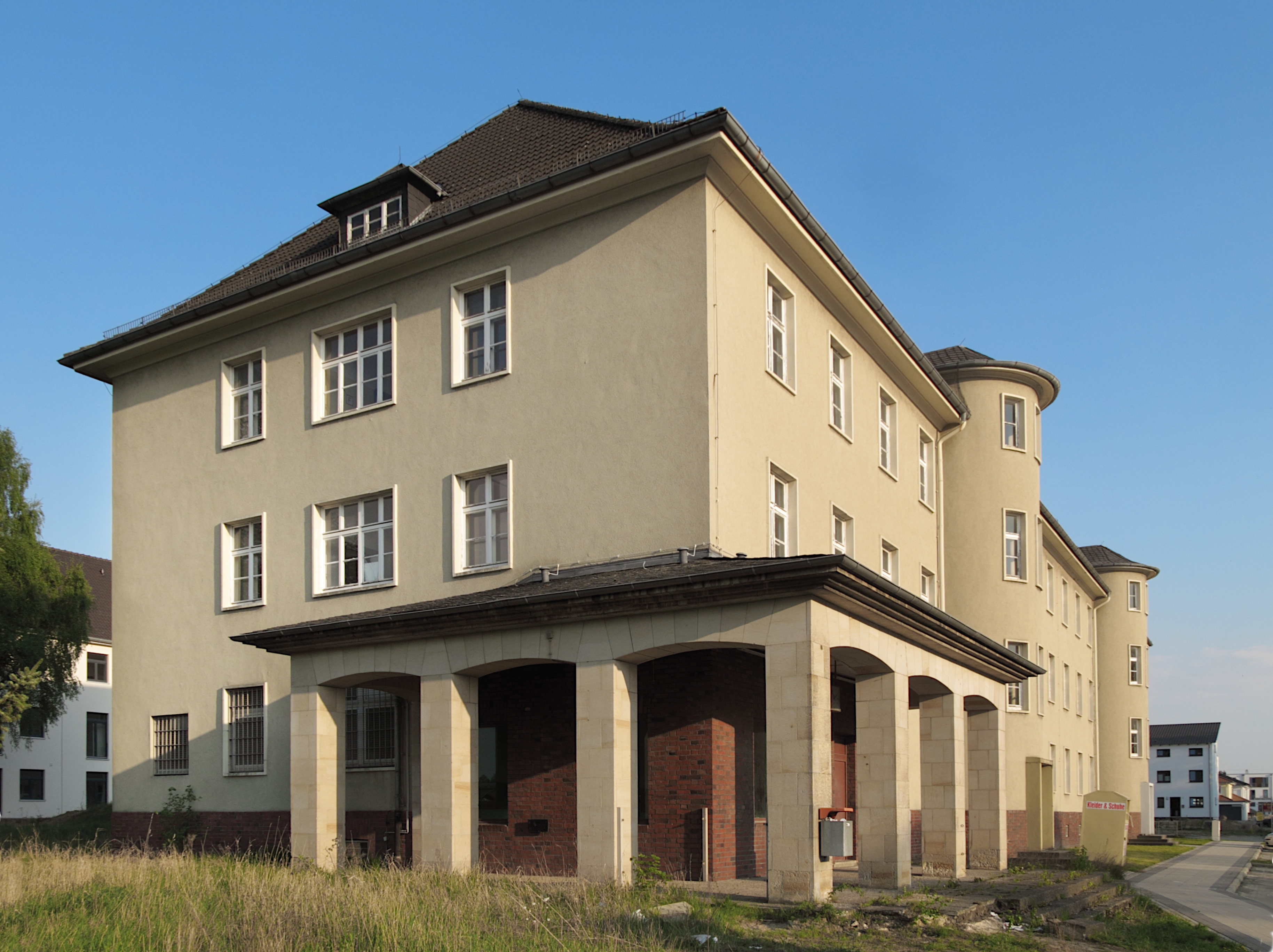 Das zum Aufnahmezeitpunkt letzte Gebäude der ehemaligen Roselieskaserne in Braunschweig an der Roseliesstraße 1